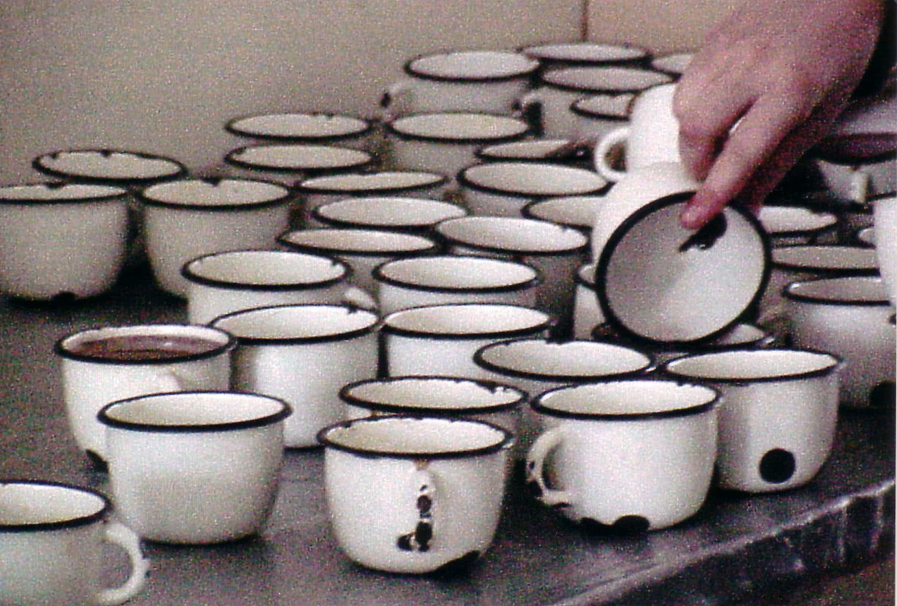 Vajilla en uno de los orfanatos con los que colabrora la ONG Ven con Nosotros.